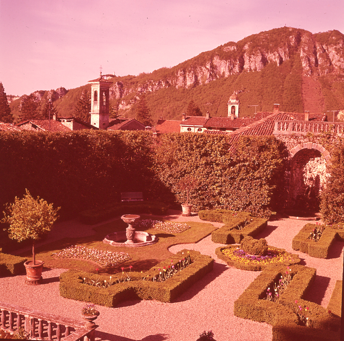 Servizio fotografico : Varese, 1975 / Paolo Monti. - Buste: 4, Fototipi: 4 : Diapositiva, sviluppo cromogeno/ pellicola ; 6x6. - ((Serie costituita da 4 diapositive identificate con i nn.: 965-968. Sulla busta RC965 manoscritto: "Varese/ Villa". La suddetta serie è contenuta nella scatola identificata con la numerazione RC938/1098. Sul coperchio della scatola manoscritto: "Località varie - Nord".